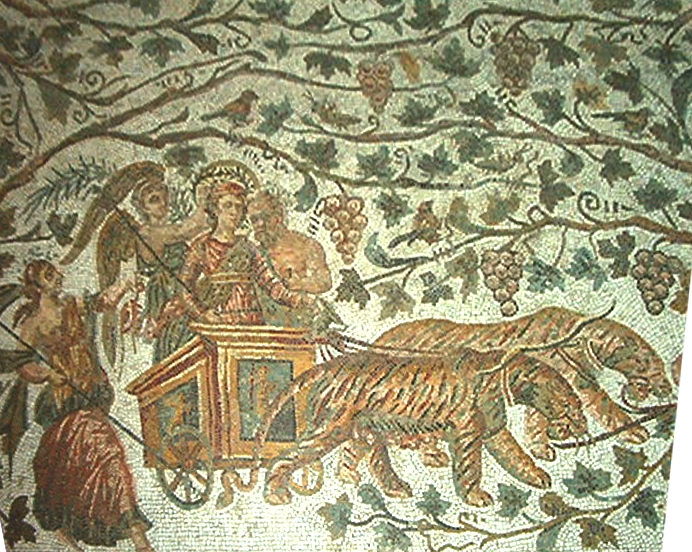 Triomphe de Bacchus, salle d'El Jem du Musée du Bardo